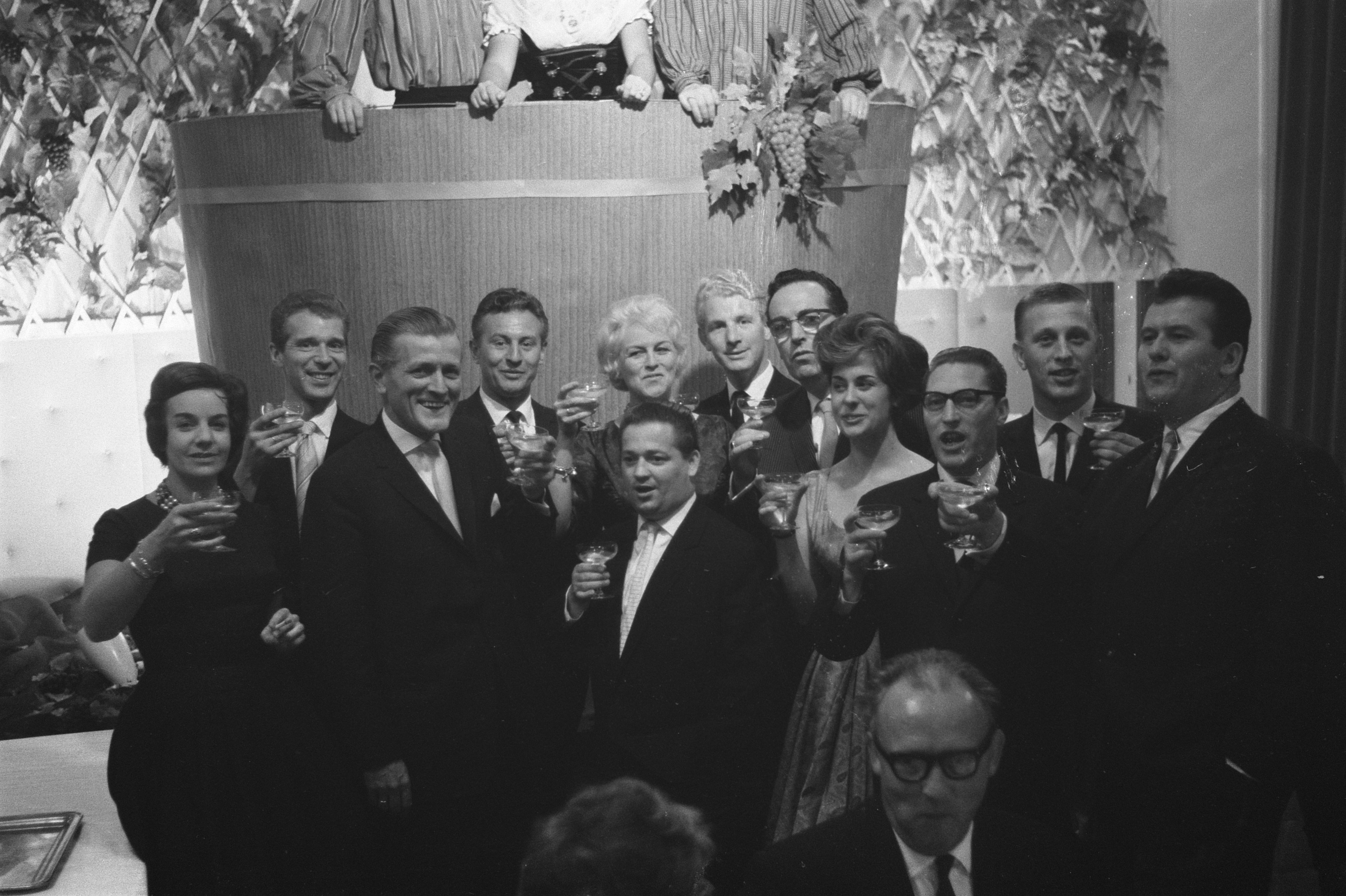 Collectie / Archief : Fotocollectie Anefo Reportage / Serie : [ onbekend ] Beschrijving : Muziek en bowldansant in het Carltonhotel T. Koopmans , W. Scholten , G. van Krevelen , D. Doorn W. Alberti , A. Heidendaal , H. Emmink , C. de Lange $ / Datum : 3 oktober 1960 Trefwoorden : MUZIEK Persoonsnaam : A. Heidendaal, C. de Lange, Carltonhotel, D. Doorn H. Emmink, Scholten, Willem, T. Koopmans, W. Alberti Fotograaf : Pot, Harry / Anefo Auteursrechthebbende : Nationaal Archief Materiaalsoort : Negatief (zwart/wit) Nummer archiefinventaris : bekijk toegang 2.24.01.05 Bestanddeelnummer : 911-6437